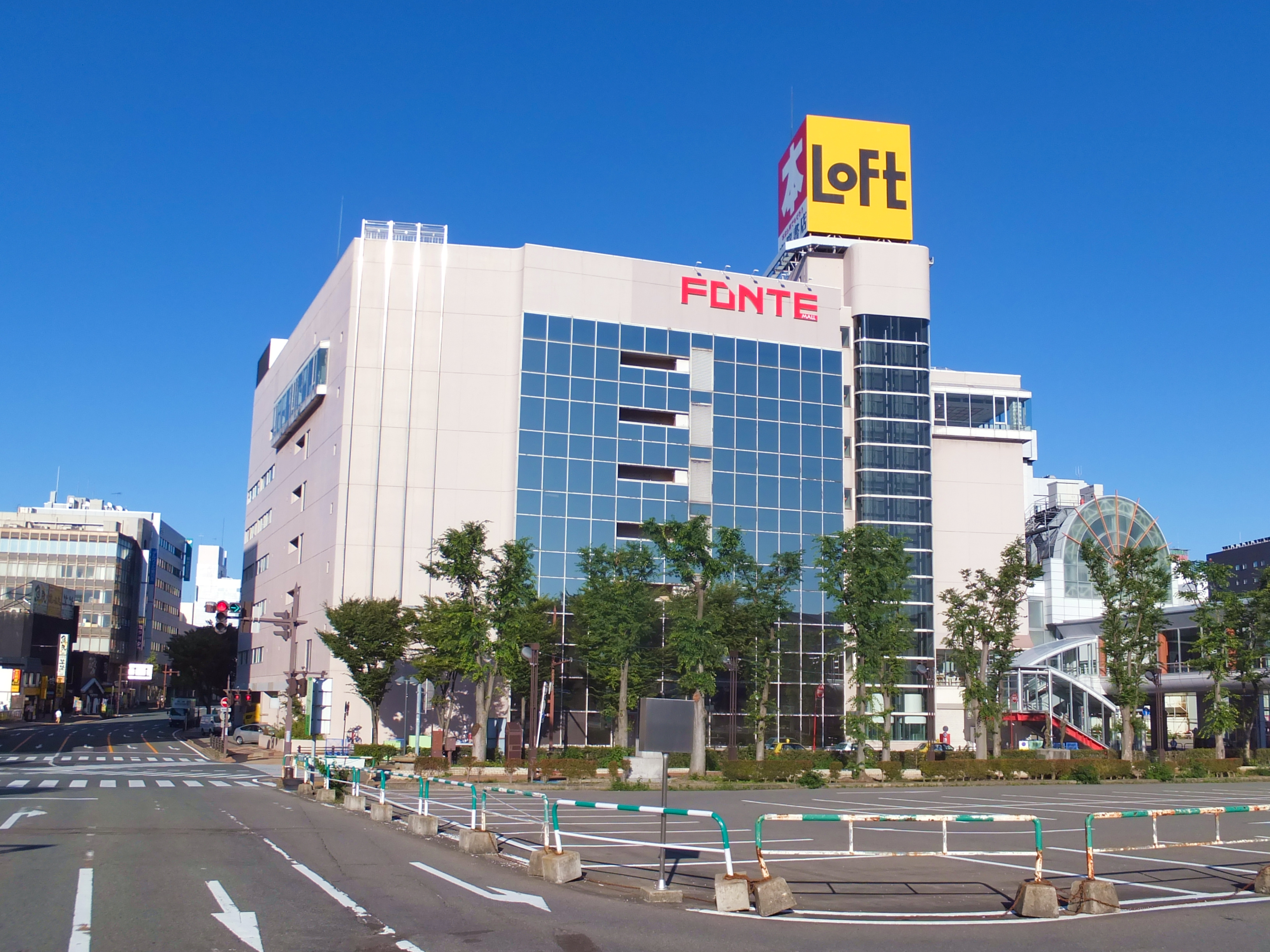 フォンテAKITA（秋田市中通）